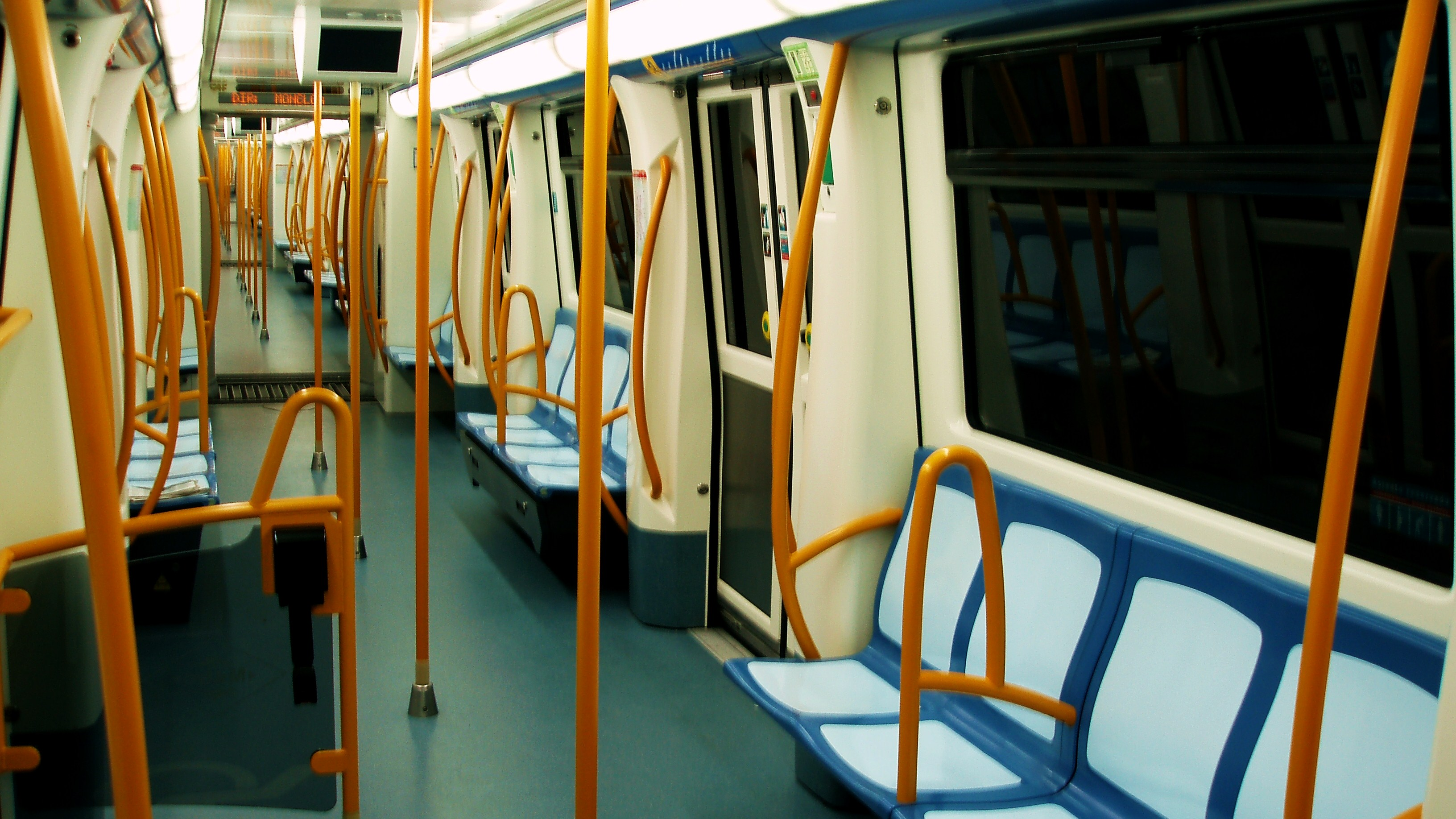 Interior de uno de los nuevos trenes serie 3000 (M-3054)